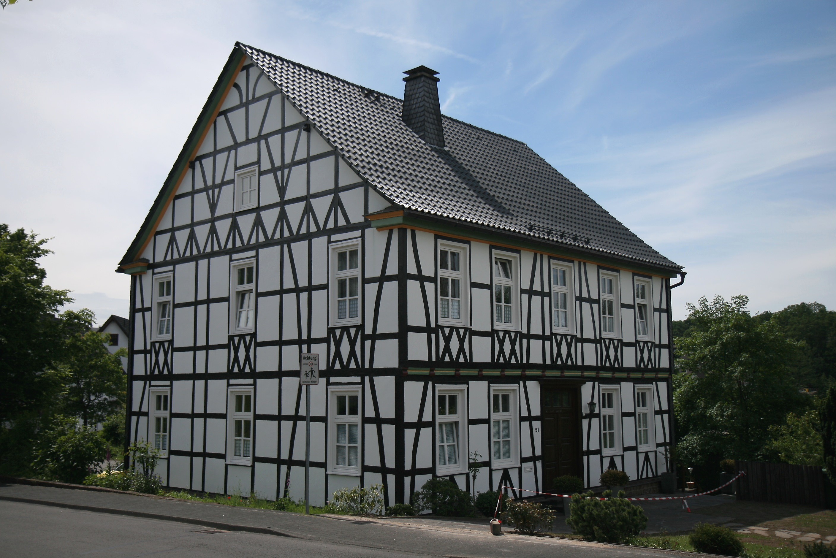 Katholisches Pfarrhaus in Olpe-Rhode. Baudenkmal seit 3. Januar 1992.